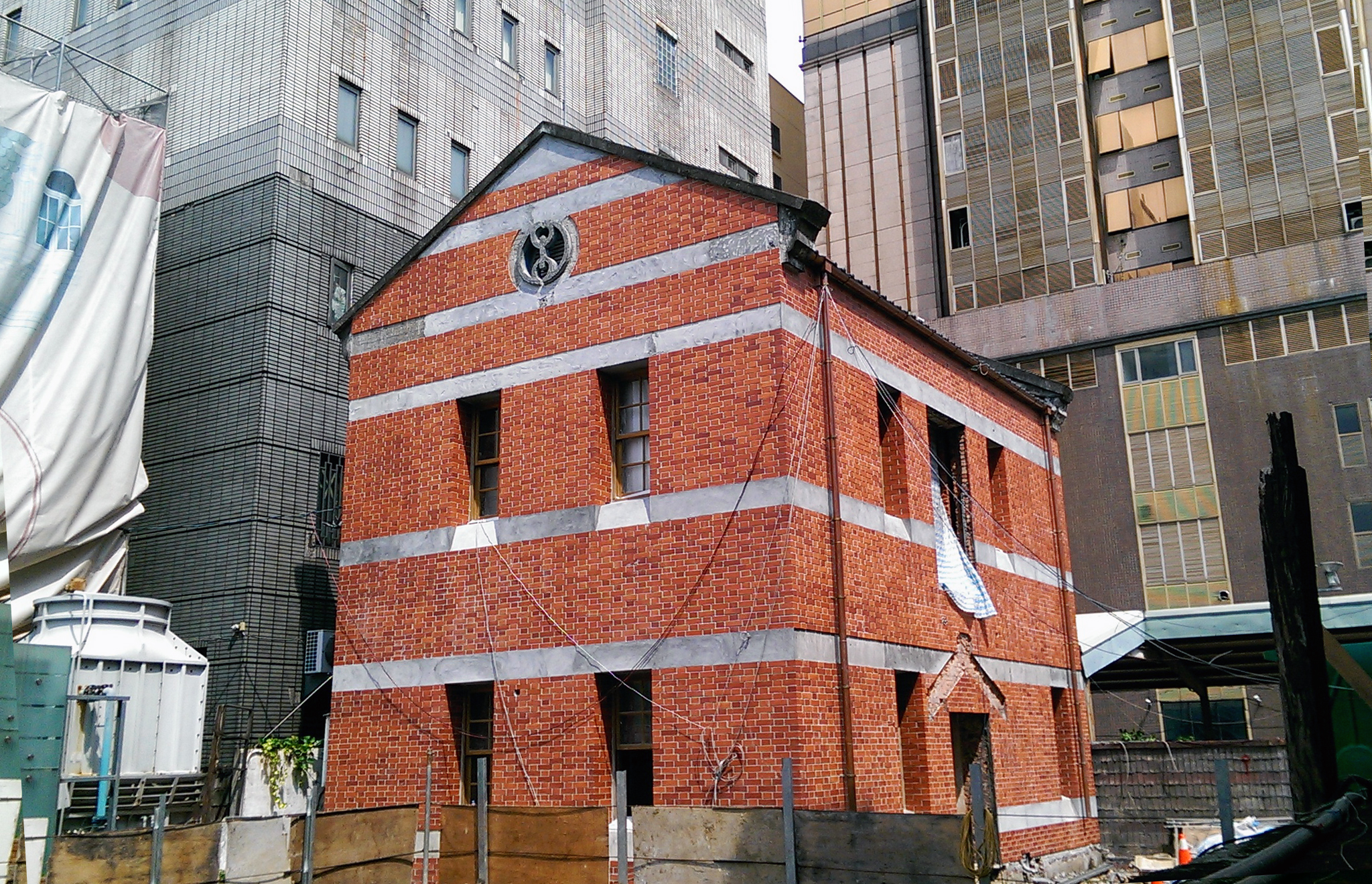 中文（台灣）: 公設質舖倉庫，臺中市歷史建築，臺中市環境保護局環境稽查大隊舊址。